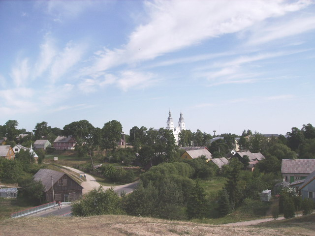 Zemaiciu Kalvarija, 2006